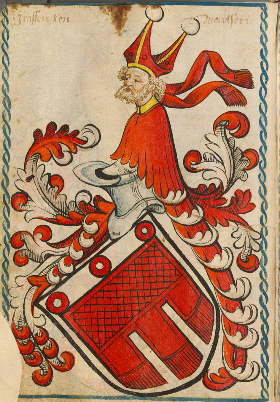 Scheibler'sches Wappenbuch, älterer Teil Montfort